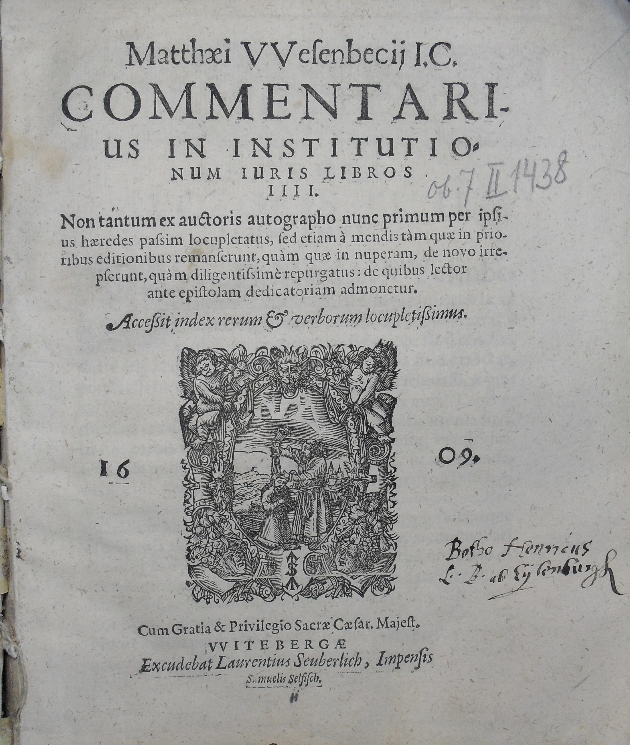 Karta tytułowa starego druku z biblioteki rodziny Eulenburg, zawierający rękopiśmienny wpis: "Botho Henricus L. B. ab Eylenburgk". Obecnie w zbiorach biblioteki Uniwersyteckiej w Toruniu, sygnatura: Ob.7.II.1438.